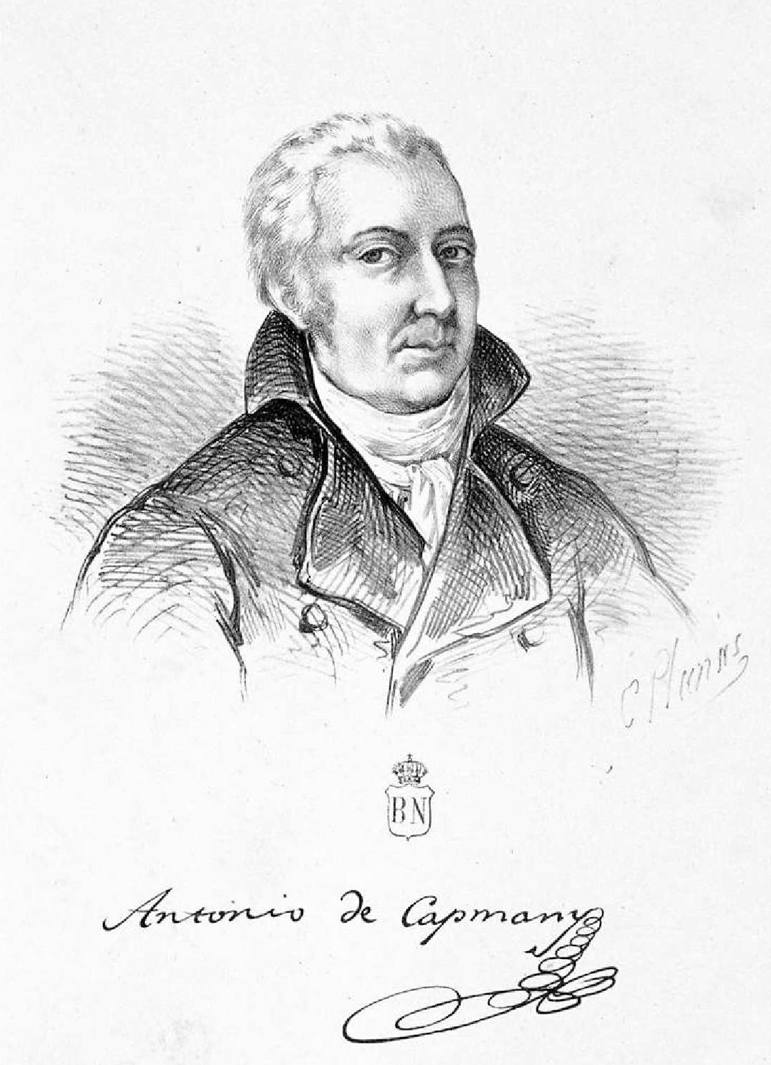 Antonio de Capmany, litografía de Eusebio Planas. Biblioteca Nacional de España.